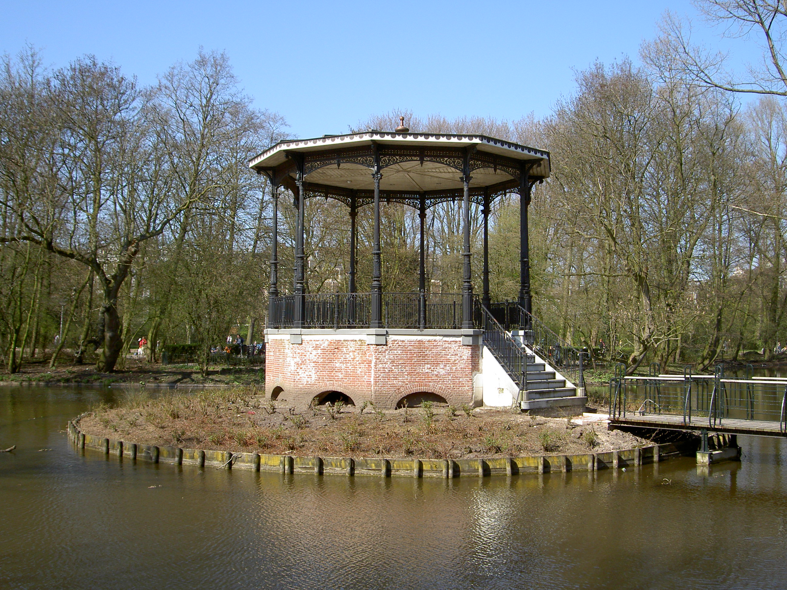 Vondelpark